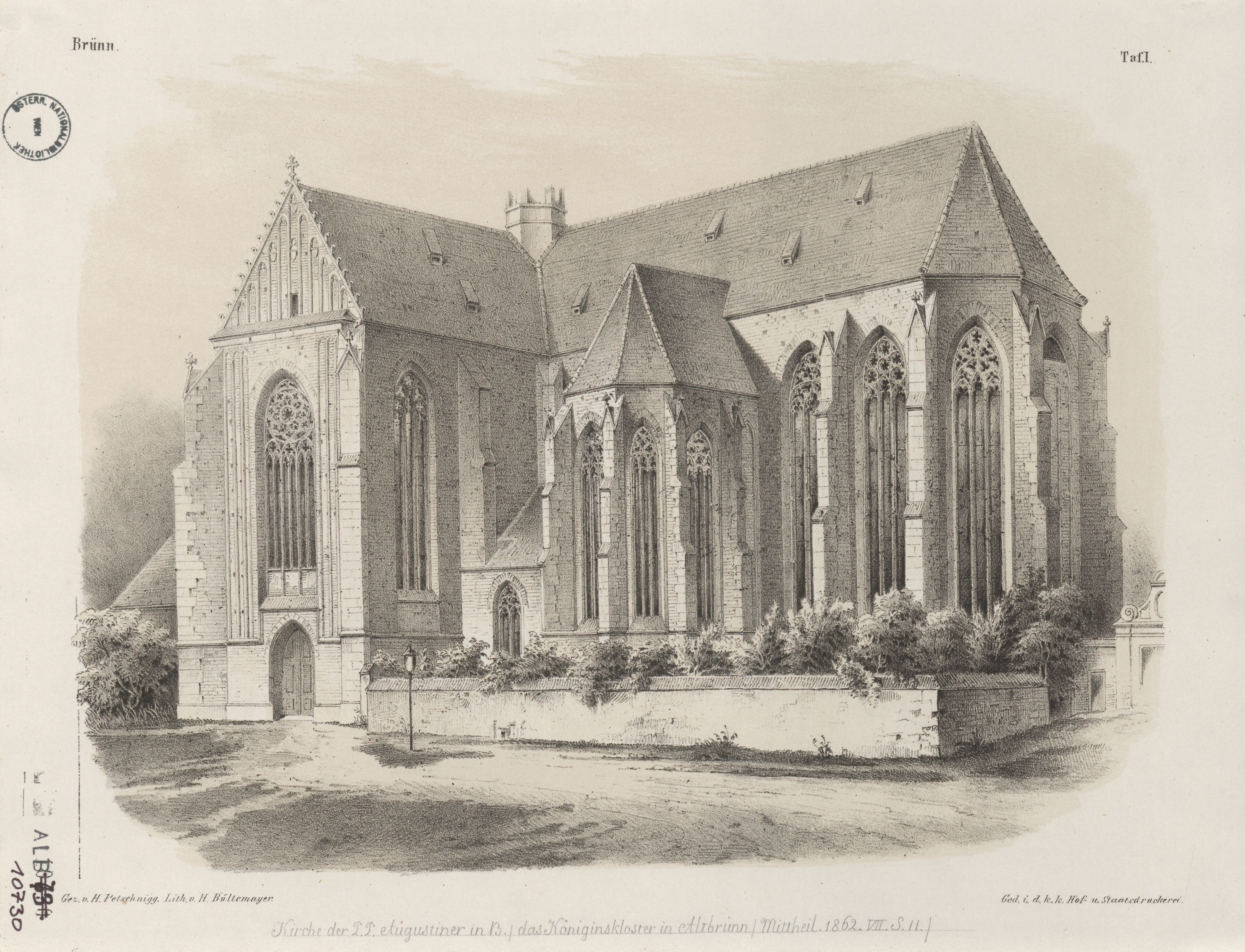 Kostel Nanebevzetí Panny Marie na Starém Brně, Brno